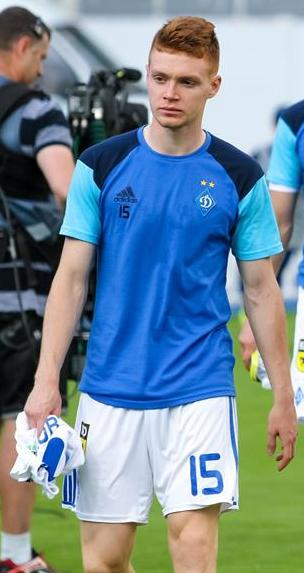 Віктор Циганков - український футболіст